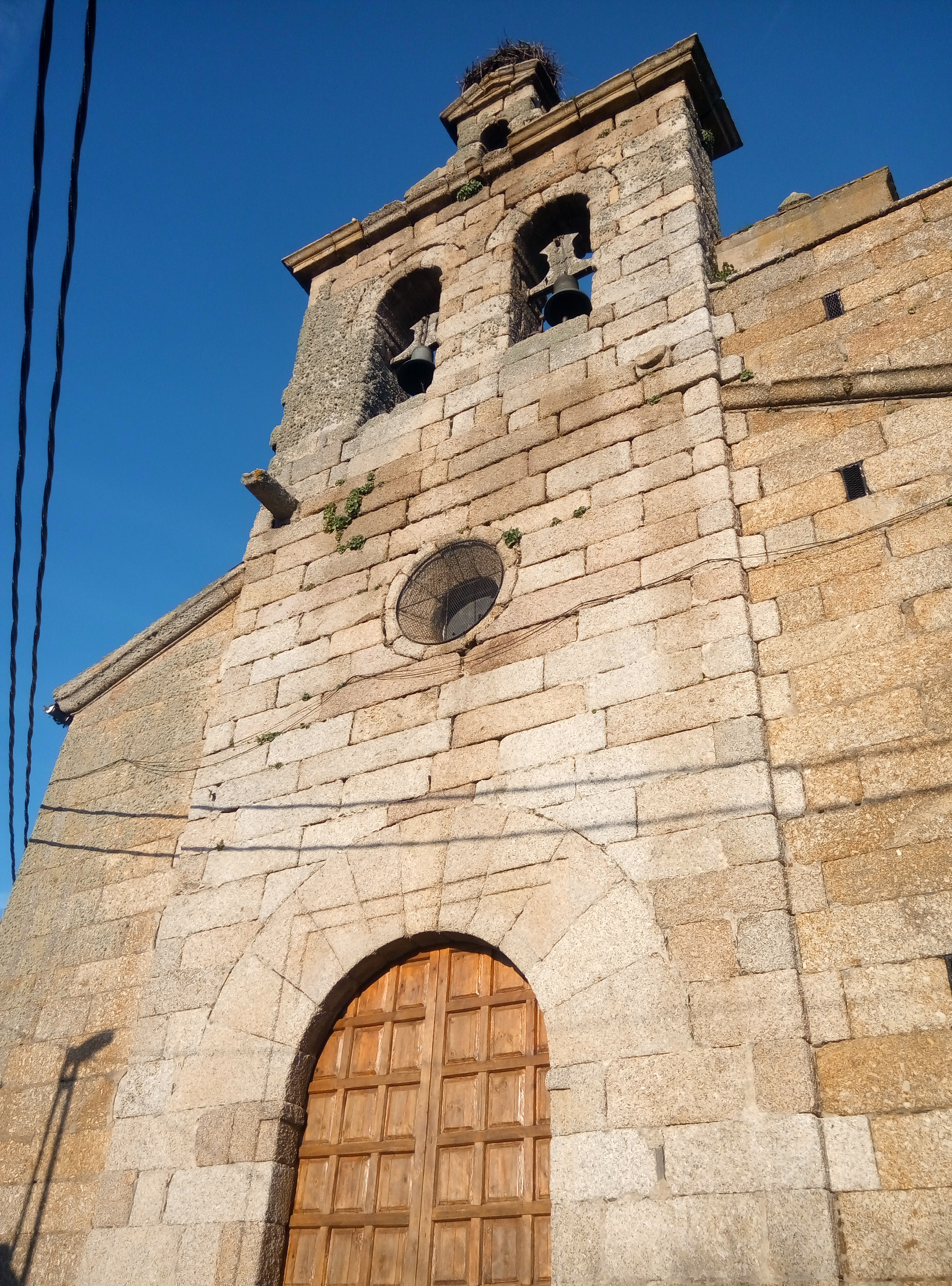 Portada renacentista y torre-campanario, de finales del siglo XVI. Iglesia de Santiago Apóstol en La Alameda de Gardón.